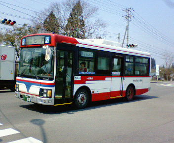 十和田観光電鉄バス 一般路線塗色：オリジナルカラー（いすゞ・エルガミオ：KK-LR233J1） ジャスコ七戸店（青森県ja:上北郡ja:七戸町）付近にて